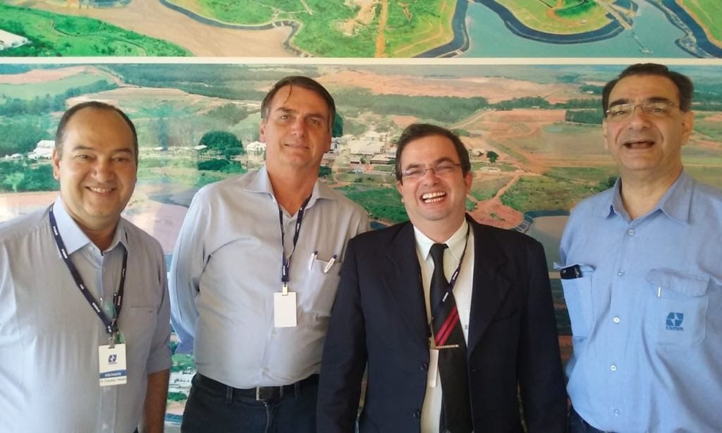 Reunião entre conselho diretor da CBMM (maior empresa de tecnologia de minério do mundo) e o então candidato à presidente Jair Bolsonaro e o juiz Dr. Renato Zupo.